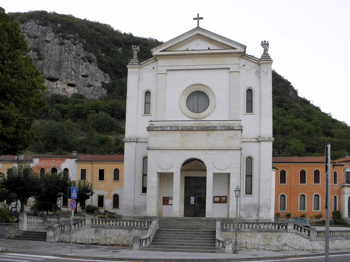 Lumignano, frazione di Longare: la chiesa parrocchiale di San Maiolo.